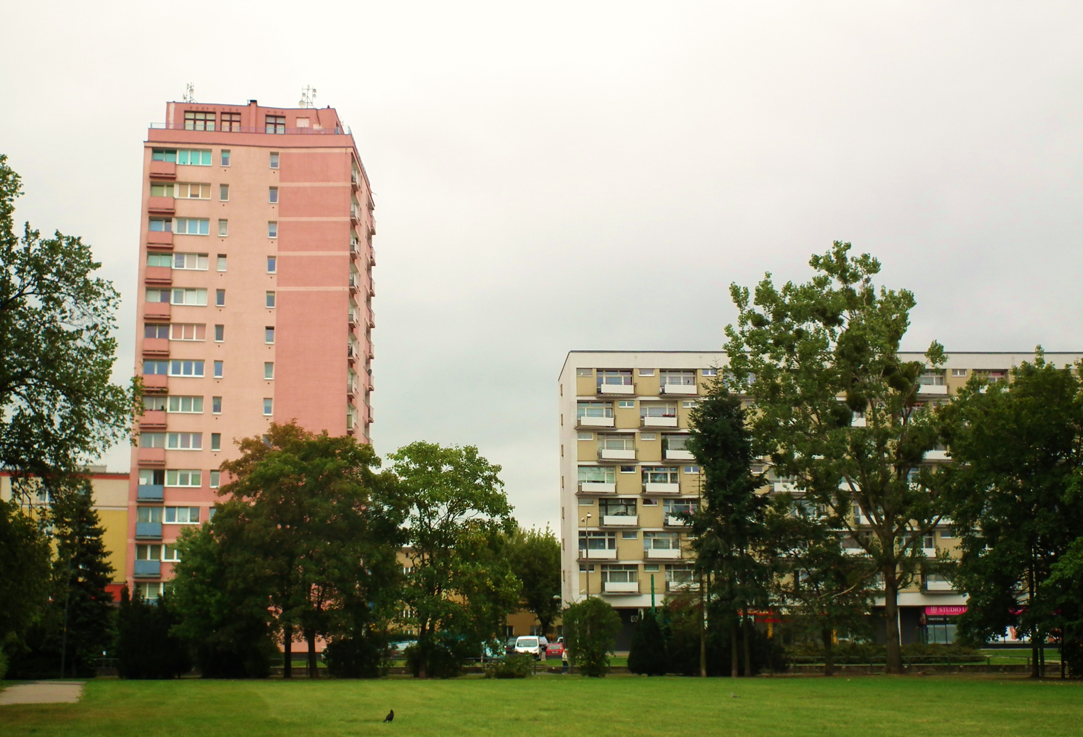 Pl. Waryńskiego - Poznań.